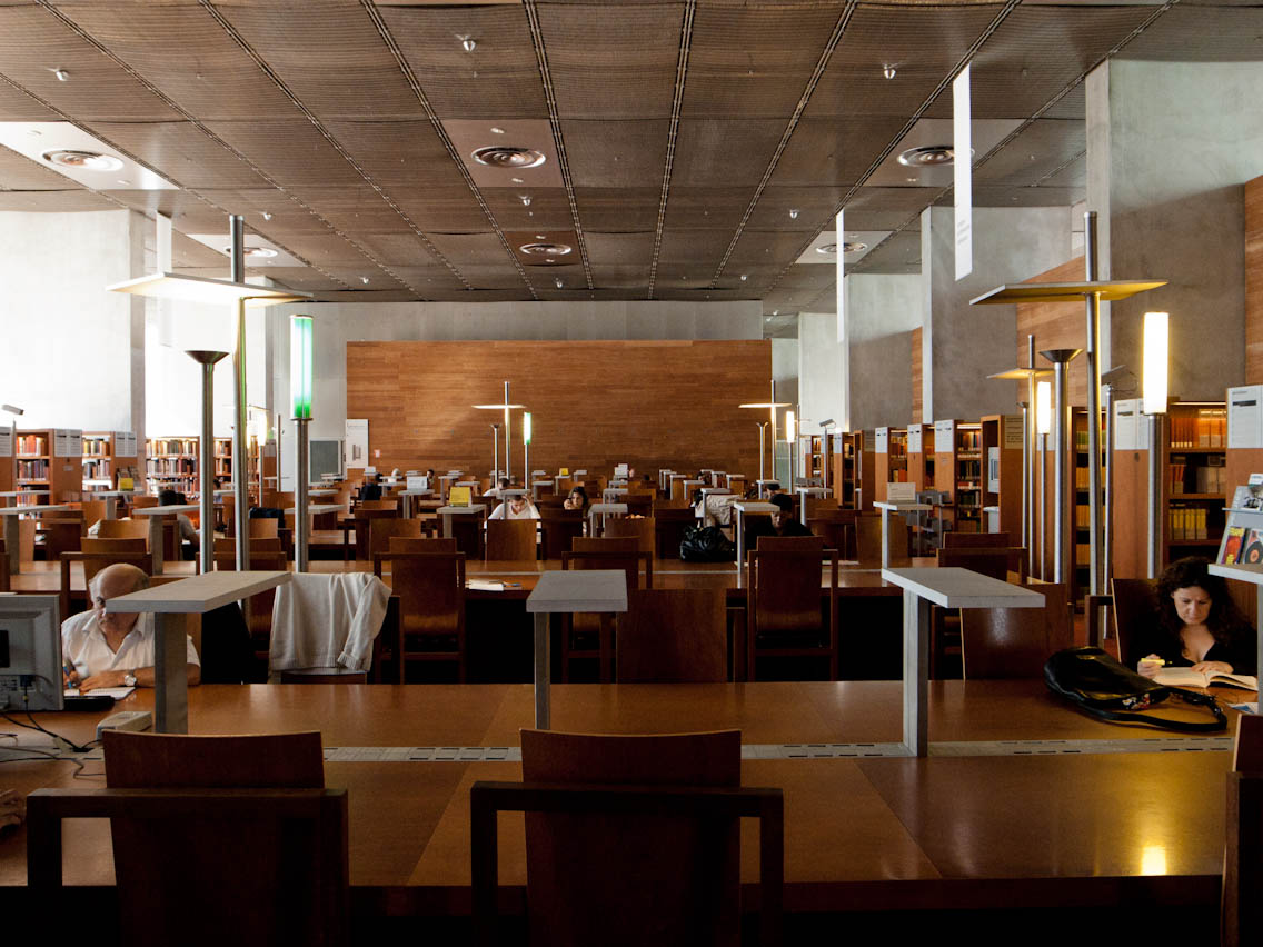 Bibliothèque nationale de France Site Tolbiac